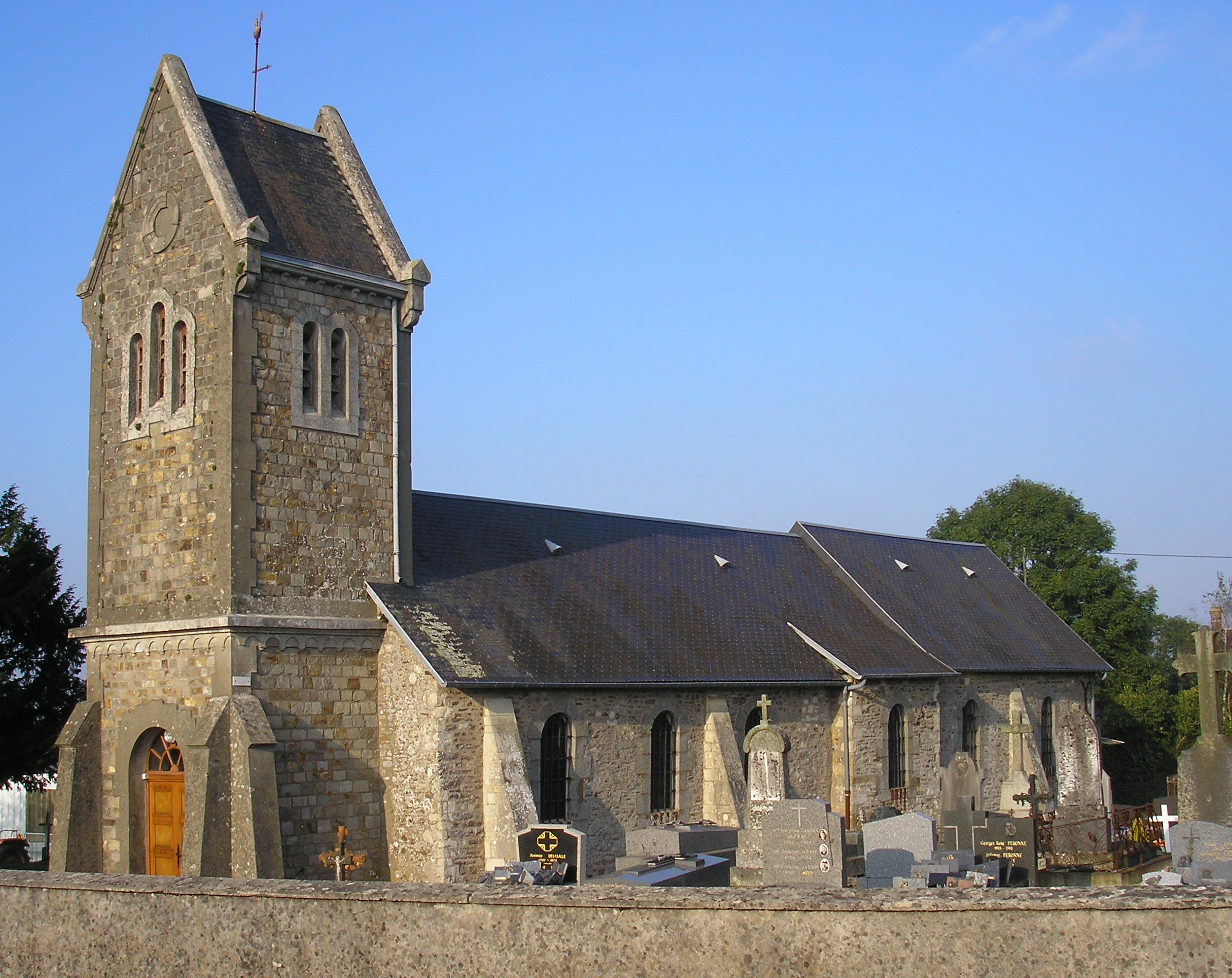 La Bigne (Normandie, France). L'église Saint-Marcouf.